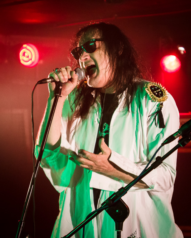 Maciej Januszko, wokalista zespołu Mech podczas koncertu charytatywnego Stefan Fest w klubie Fonobar w Warszawie, 1 maja 2013.